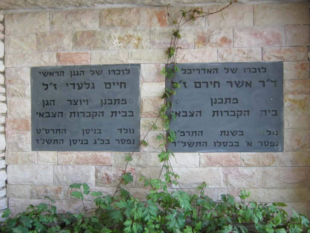 שלטי זיכרון לאשר חירם וחיים גלעדי בכניסה לבית הקברות הצבאי בהר הרצל